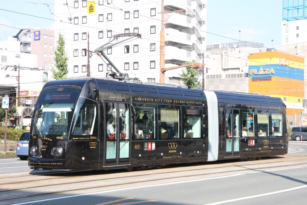 熊本市電0803「COCORO」